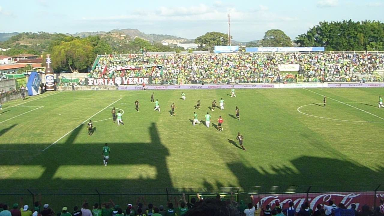 partido de marathon contra olimpia en el estadio yankel rosenthal